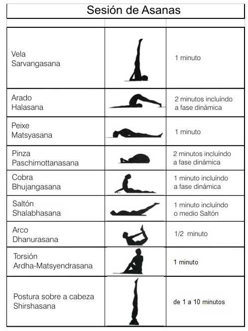 Cadro coas asanas básicas.